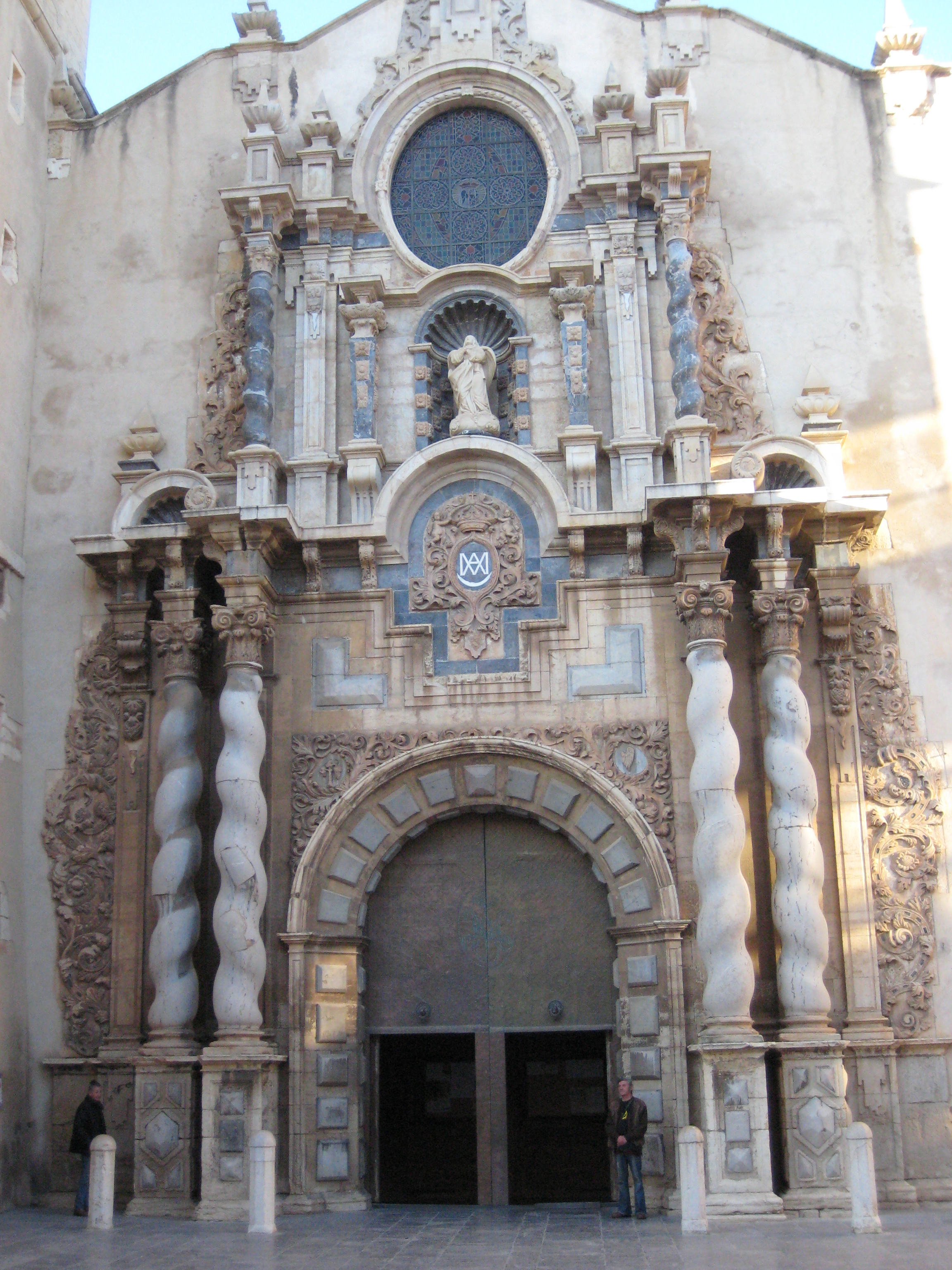 Portada principal de l'Església de la Mare de Déu de l'Assumpció de Vinaròs (Baix Maestrat)